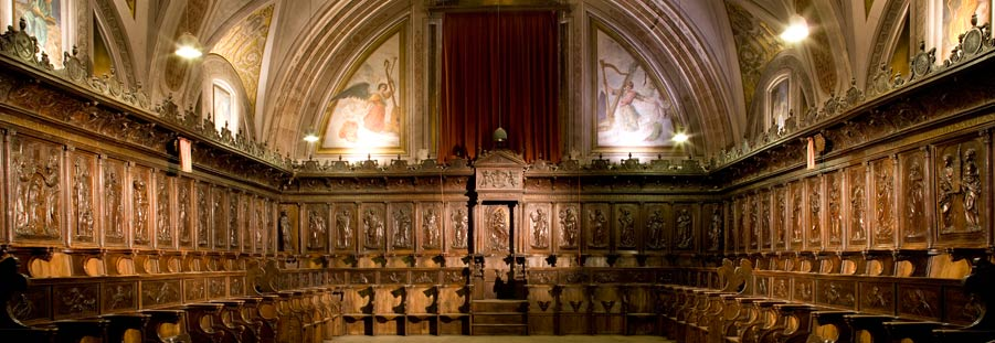 Coro de Santo Domingo de Guzmán de Ocaña (Toledo).